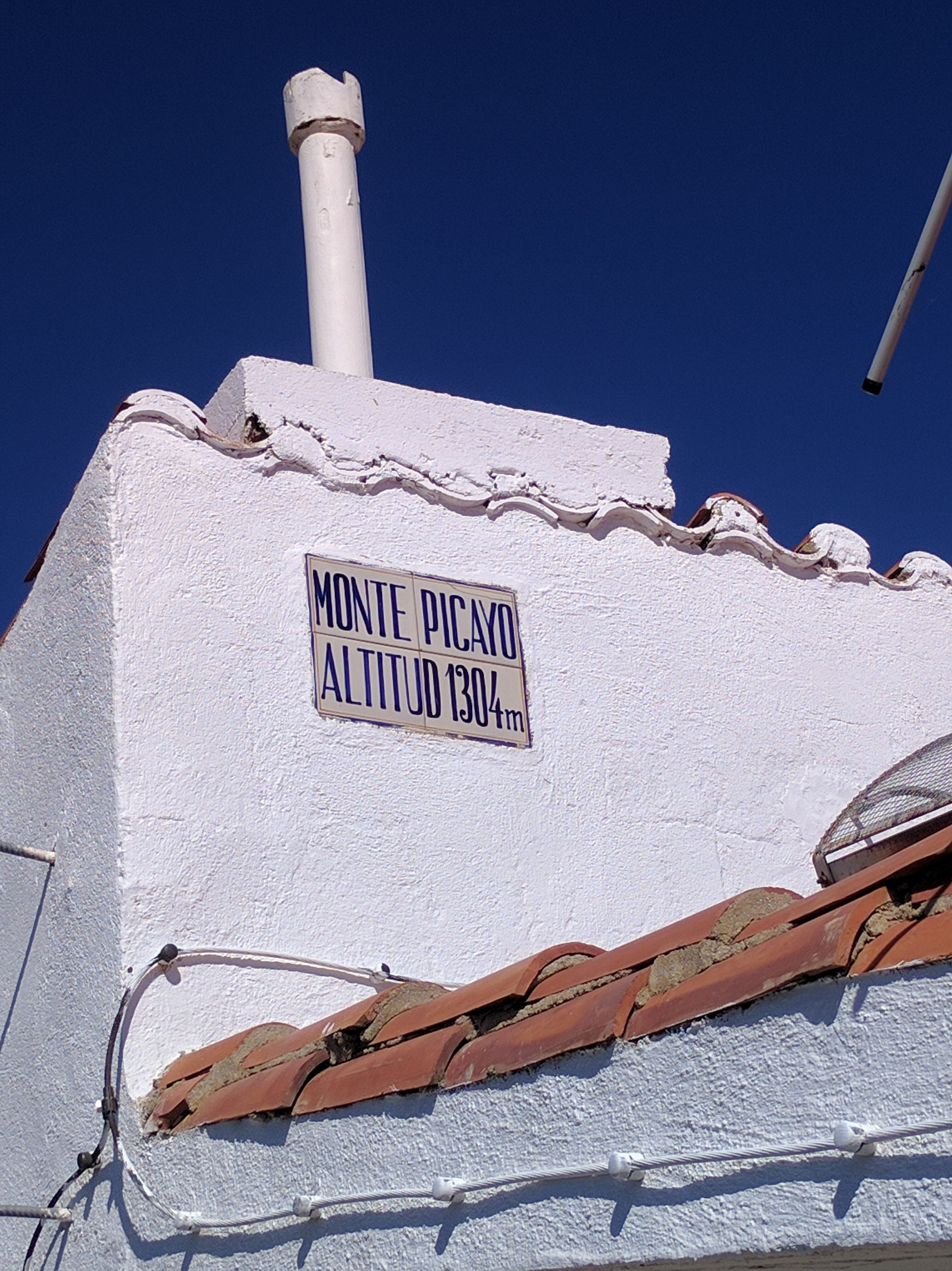 Placa de l'altura del Picaio